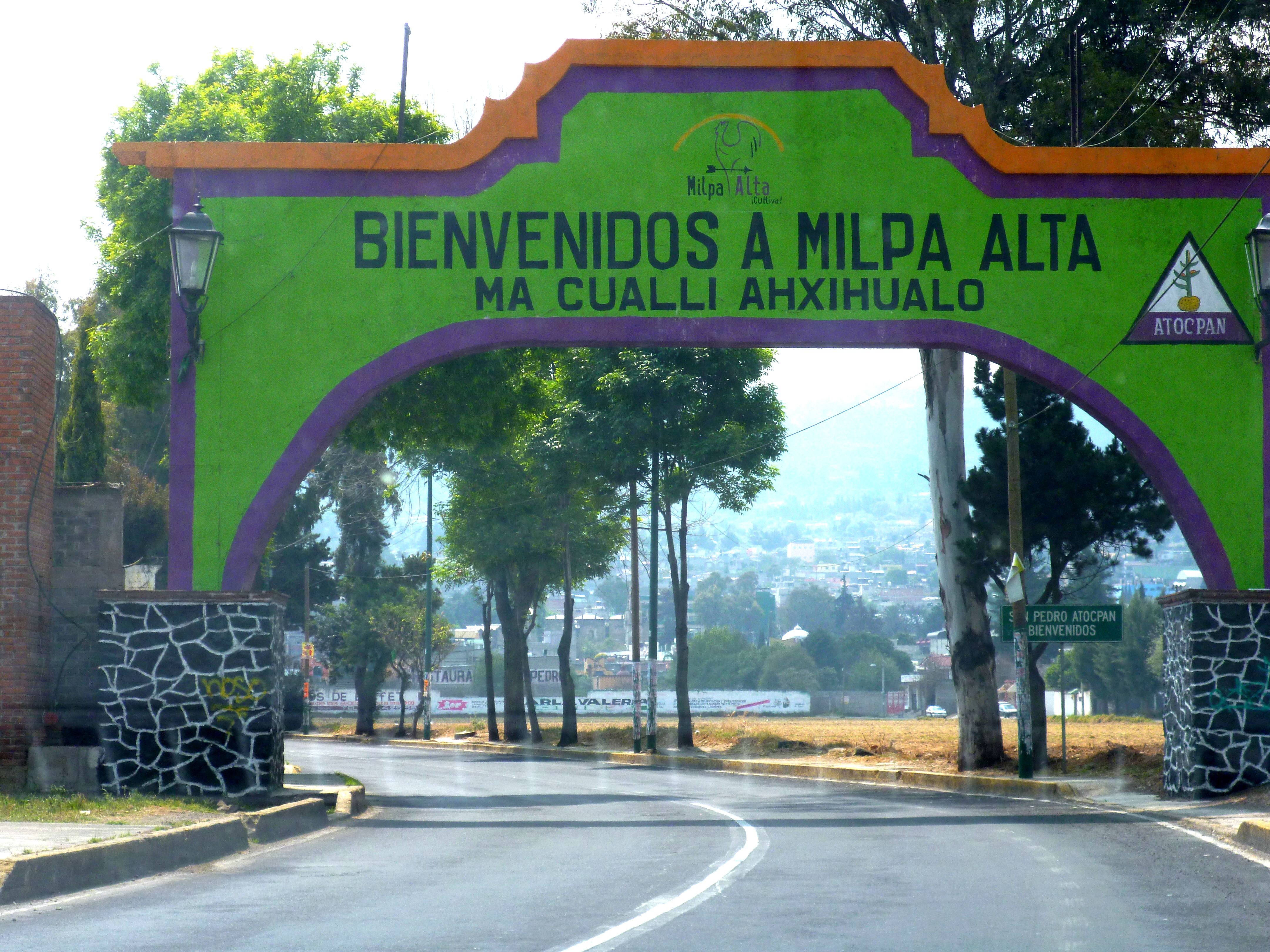 la entrada a el Puebo de Milpa Alta, Distrito Federal, México